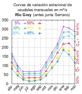 Curvas de variación estacional del río Grey antes de junta con río Serrano. # Dirección General de Aguas # Diagnóstico y clasificación de los cursos y cuerpos de agua según objetivos de calidad. Cuenca del río Serrano. # Santiago de Chile # Ministerio de Obras Públicas (Chile) # 2004 # url: # urlarchivo: # Tabla 4.8: Río Grey antes junta Serrano (m3/s), pág. 31 mes 5% 10% 20% 50% 85% 95% abr 167.40 154.66 140.51 116.98 93.34 81.74 may 100.65 93.23 84.61 69.62 53.77 45.72 jun 67.75 55.61 44.89 32.40 25.02 22.80 jul 68.24 58.75 48.78 33.57 20.13 14.26 ago 68.14 58.36 48.37 33.79 21.72 16.75 sep 71.47 58.32 46.70 33.13 25.10 22.68 oct 118.02 105.04 91.51 71.08 52.93 44.70 nov 172.16 159.62 145.64 122.25 98.53 86.81 dic 219.09 208.44 195.53 170.87 140.50 122.66 ene 315.09 284.62 256.00 219.31 194.30 185.70 feb 306.67 285.71 262.24 222.60 181.91 161.57 mar 287.29 261.40 232.81 185.62 138.78 116.06 This plot was created with Gnuplot.